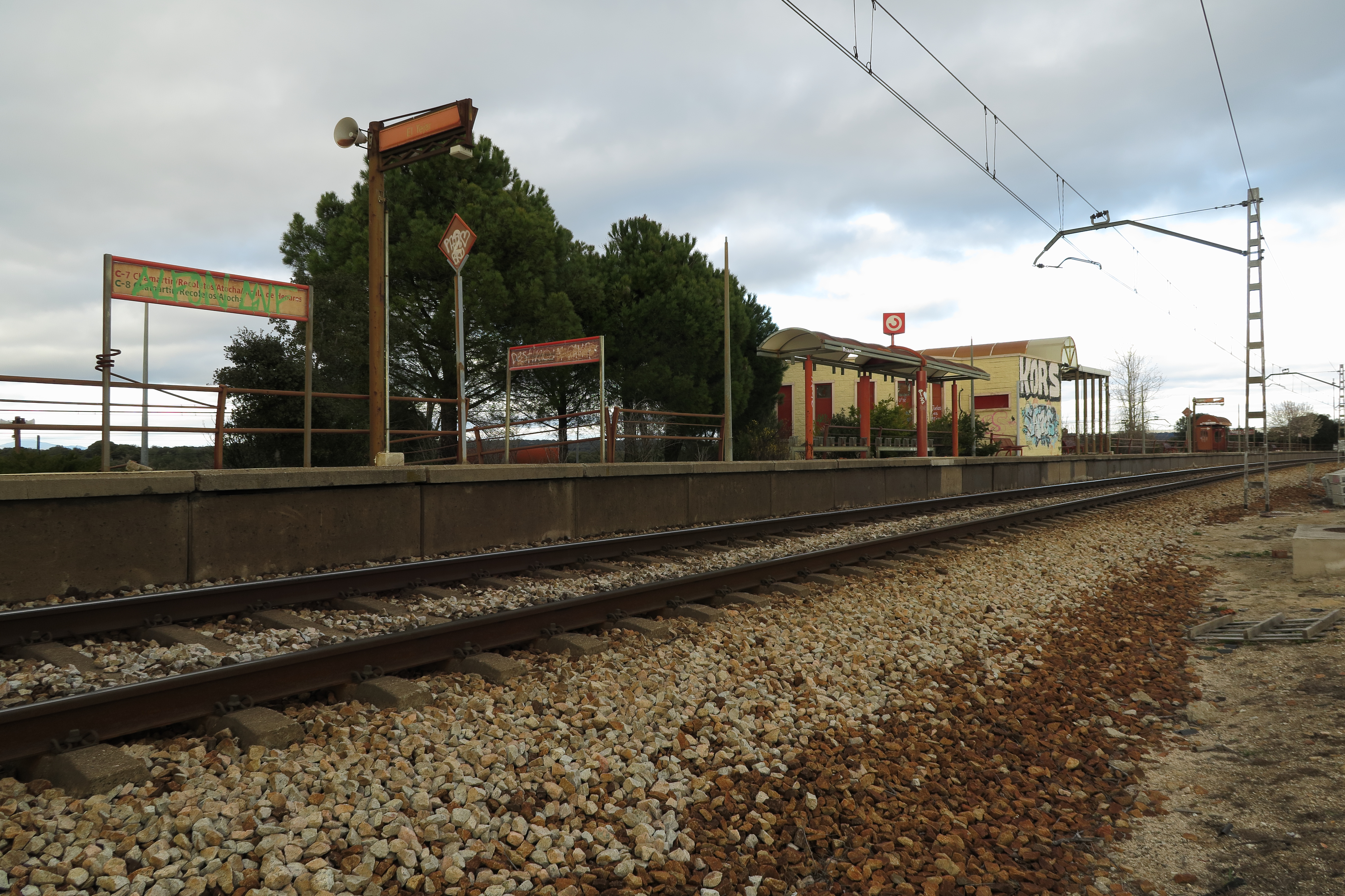 Estación El Tejar (Madrid)